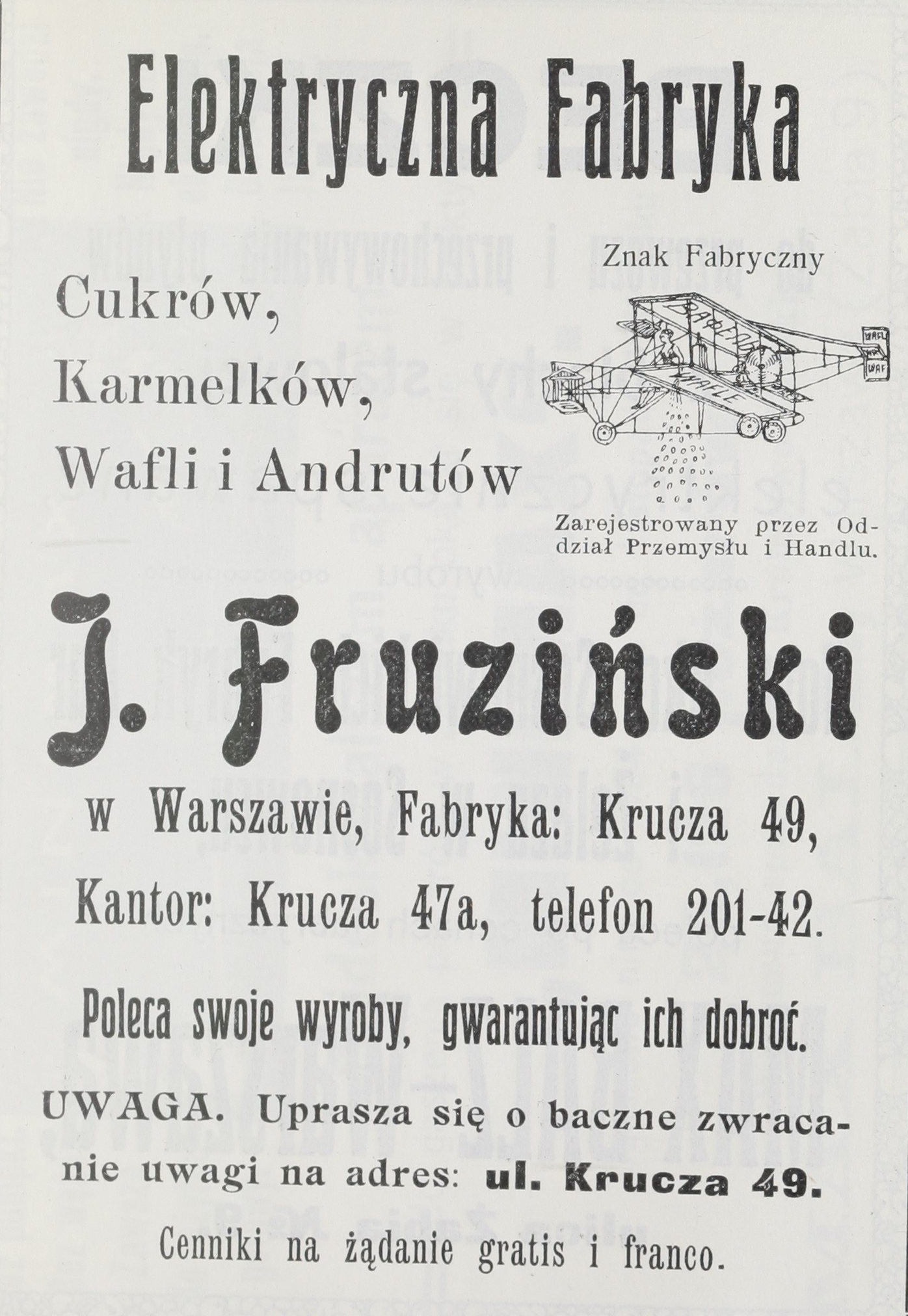 Jan Fruziński, reklama z 1912 w "Najnowszy ilustrowany przewodnik po warszawie i okolicach"